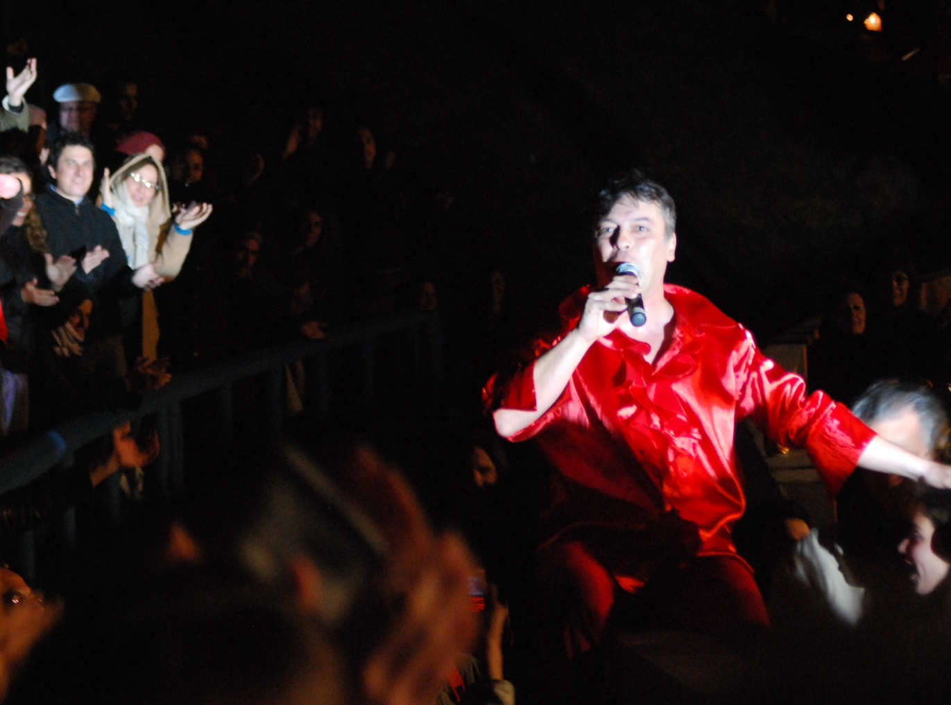 Cantante de "Emir Kusturica & The No Smoking Orchestra", Nele Karajlić. Recital en el Teatro de Verano de Montevideo, el 17 de octubre de 2008.